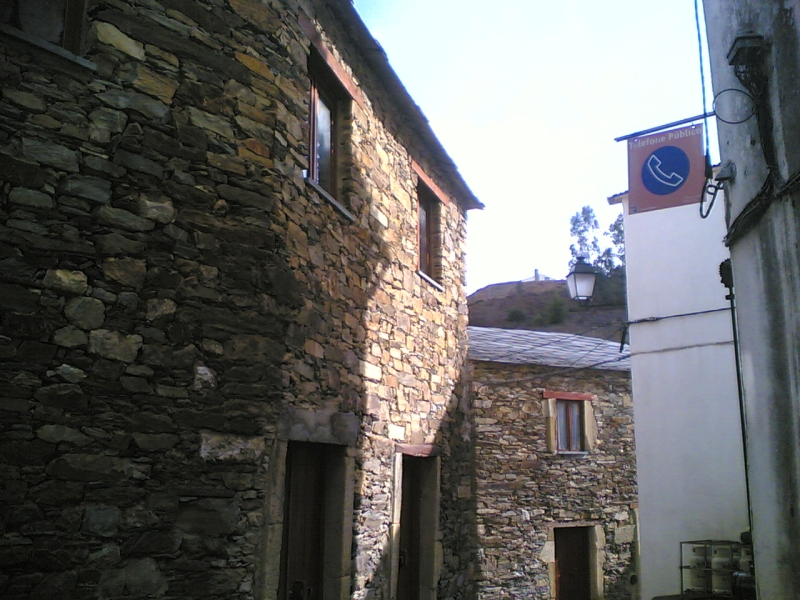 Aldeia de Fajão, Pampilhosa da Serra, Portugal